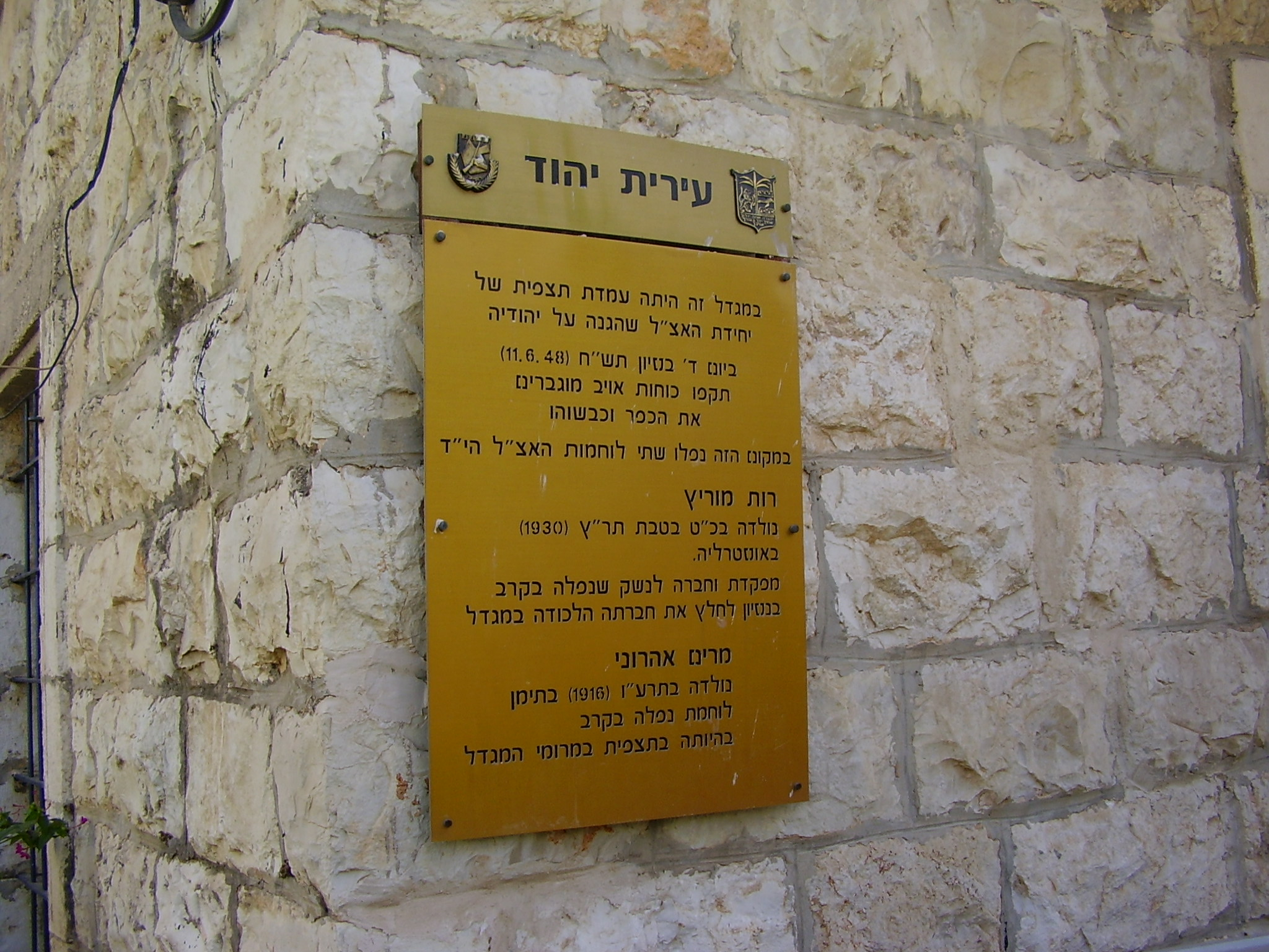 לוח הנצחה בקיר המסגד ביהוד ללוחמות האצ"ל רות מוריץ ומרים אהרוני